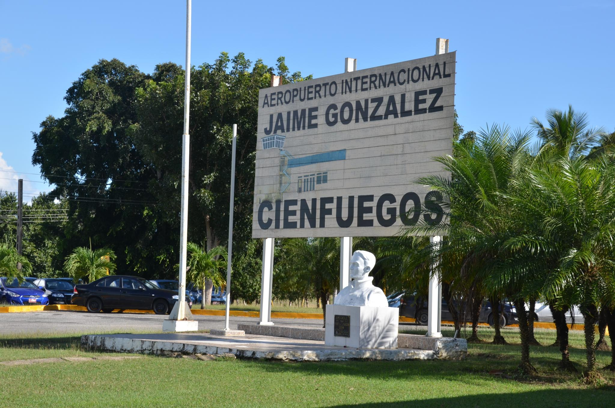 Airport sign "Aeropuerto Internacional Jaime González" in Cienfuegos, Cuba.